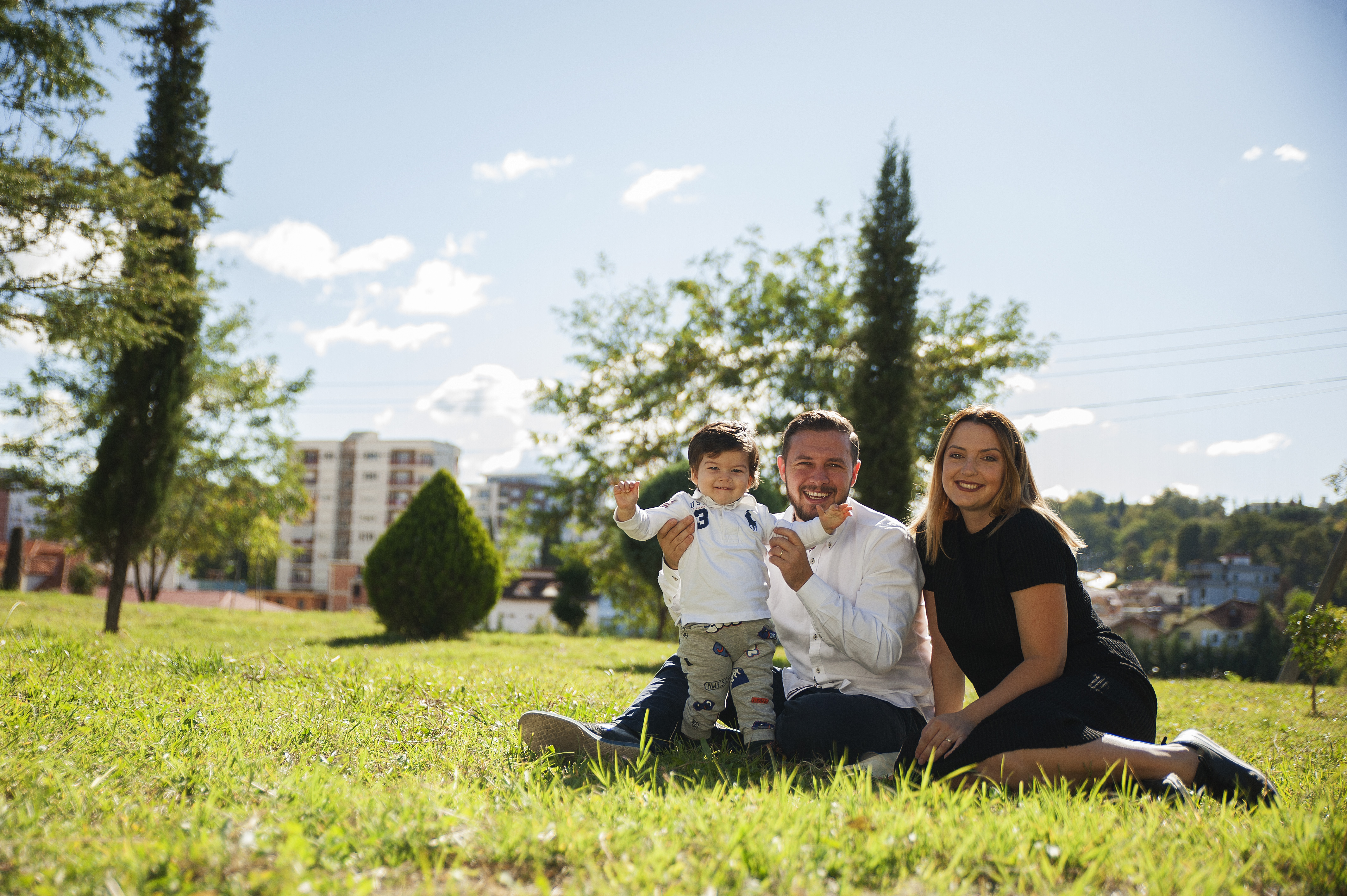 Foto, familja Malaj